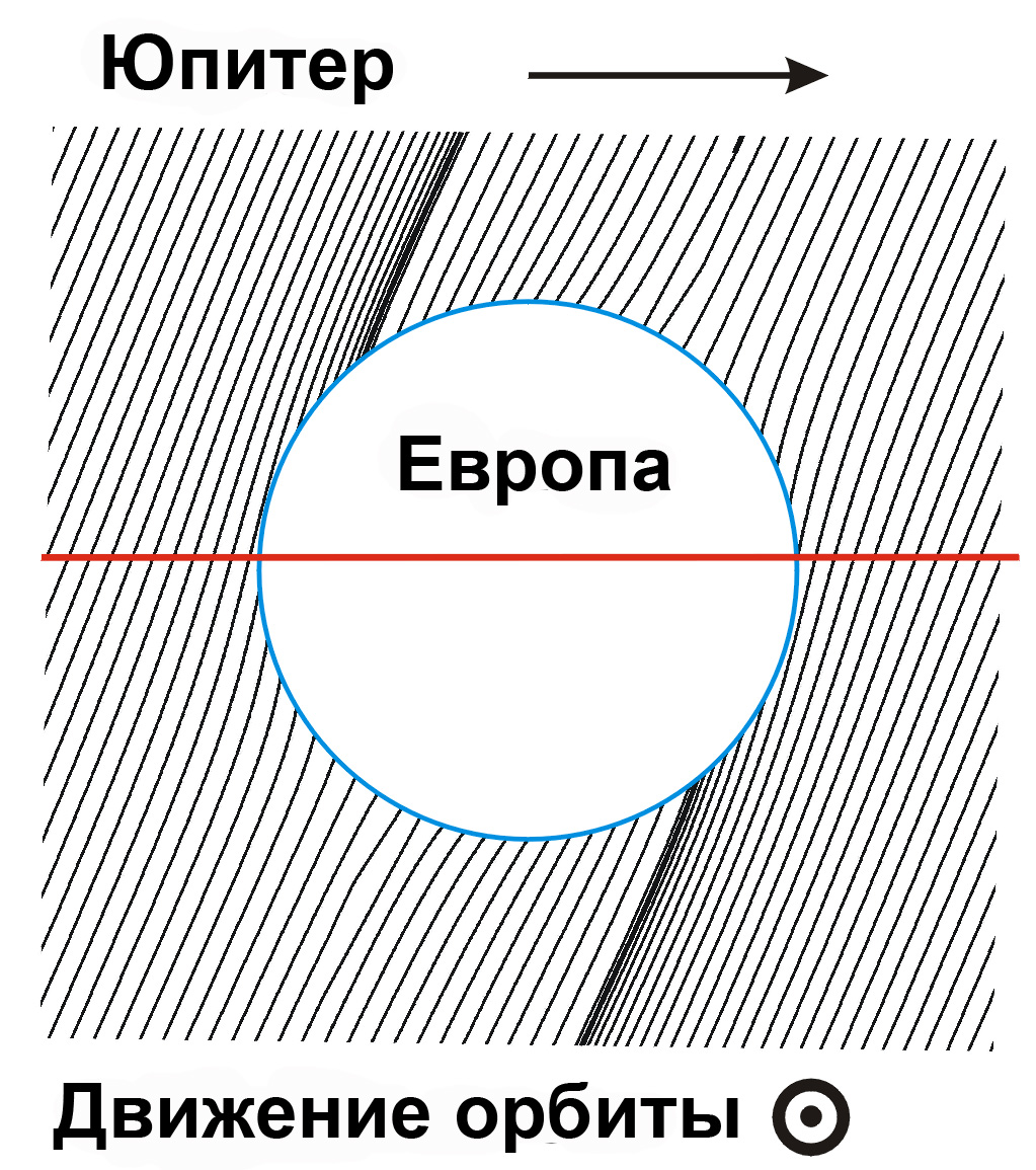 Магнитное поле Европы в поле Юпитера. Красная полоса — направление движения и одновременно экватор спутника. Видно, что магнитные полюса Европы сильно отклонены от полюсов географических.